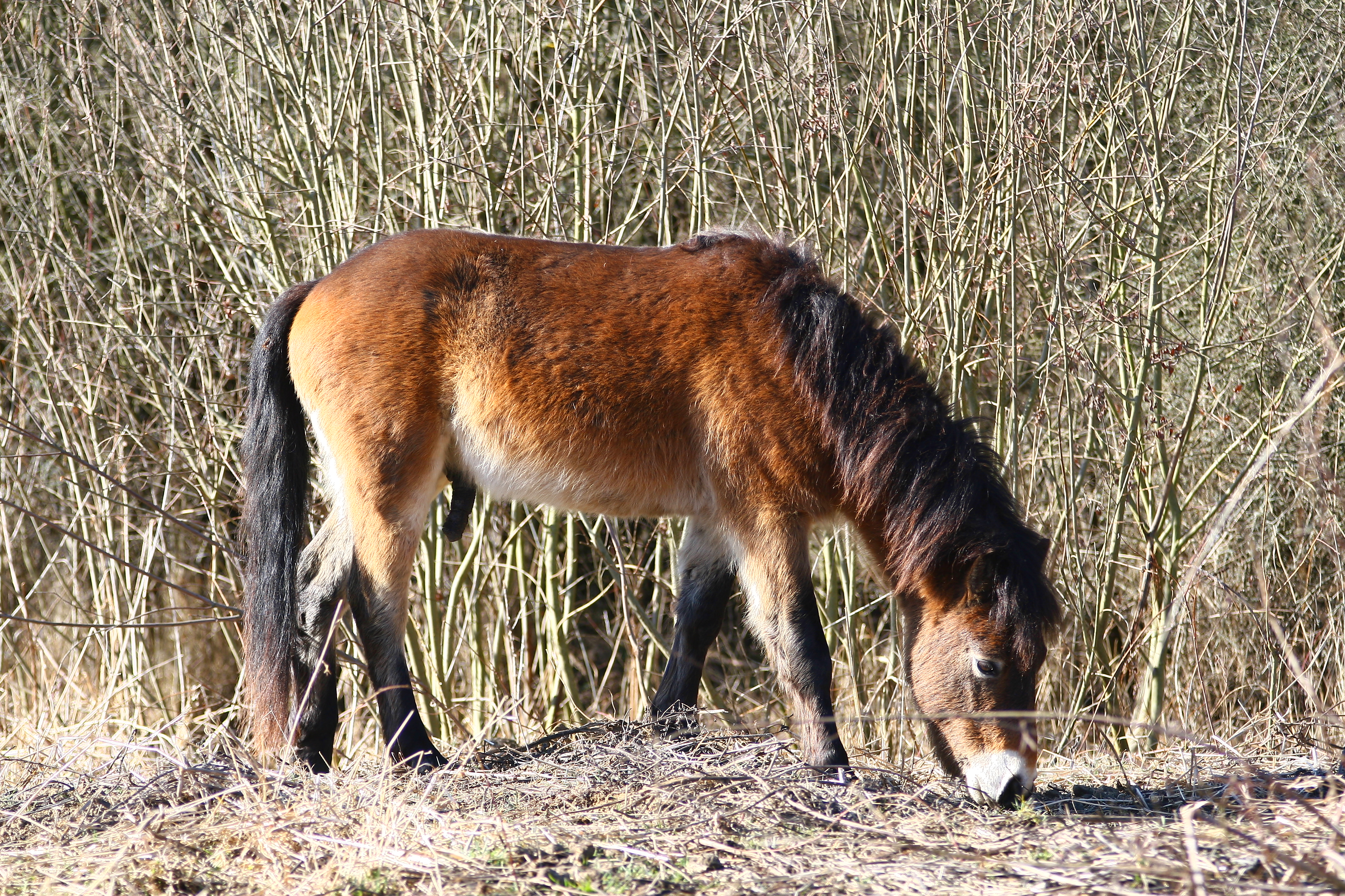 Exmoorští poníci ze stáda šesti hřebců na Šlovickém vrchu u Dobřan v EVL Dobřany.